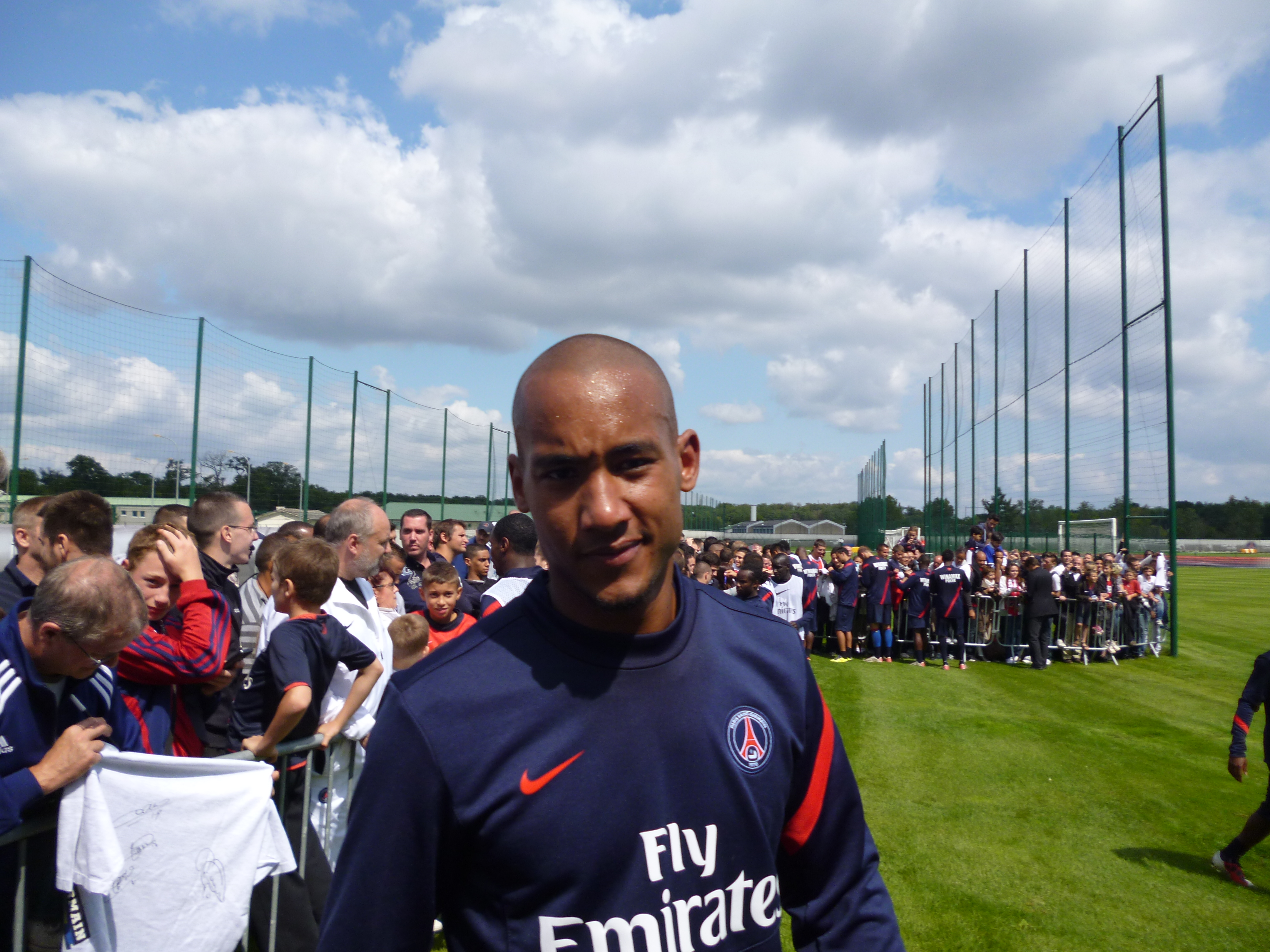 Loris Arnaud au Camp des Loges le 24 juillet 2011. Photo Vincent Hanquet pour